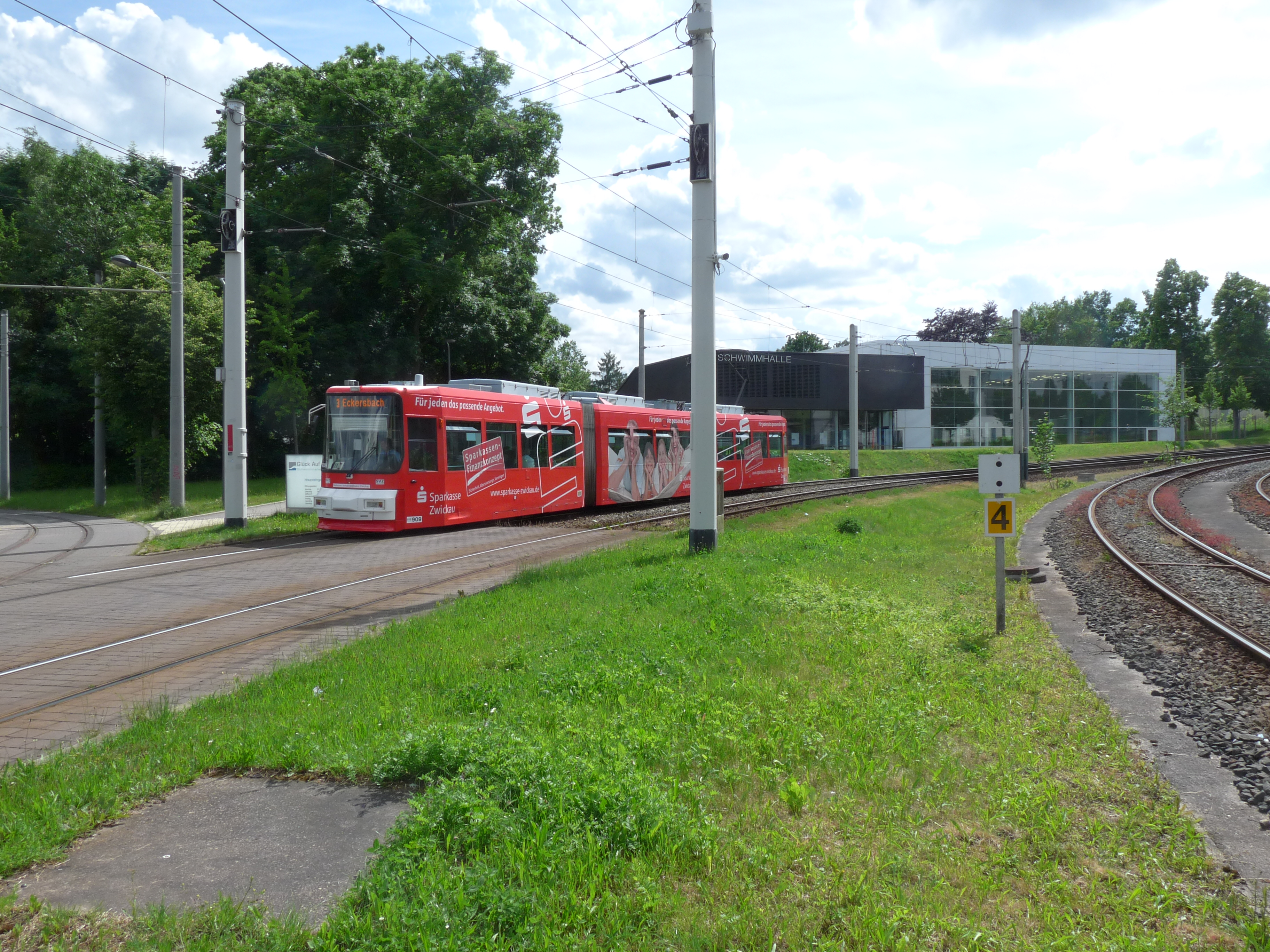 Zwickau tram